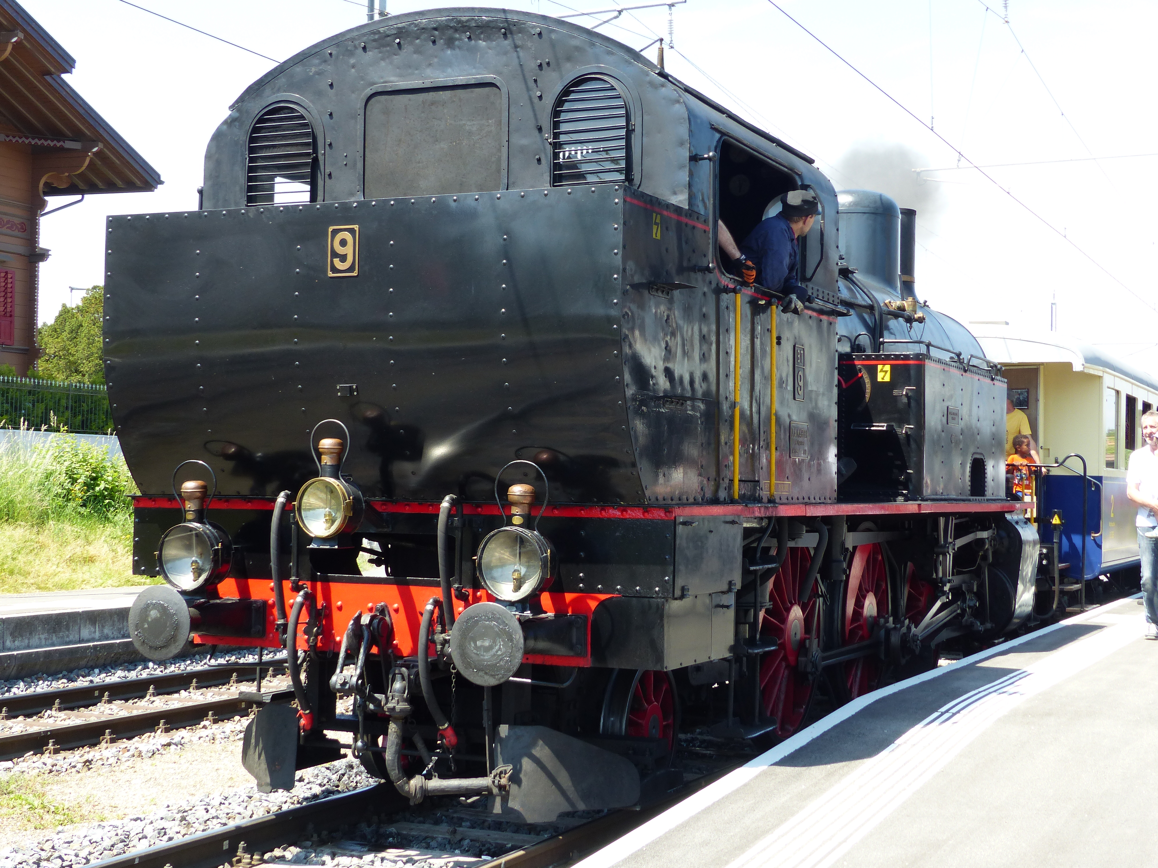 Dampflok Eb 3/5 Nr 9 des Dampf-Loki-Club Herisau im Bahnhof Stein am Rhein